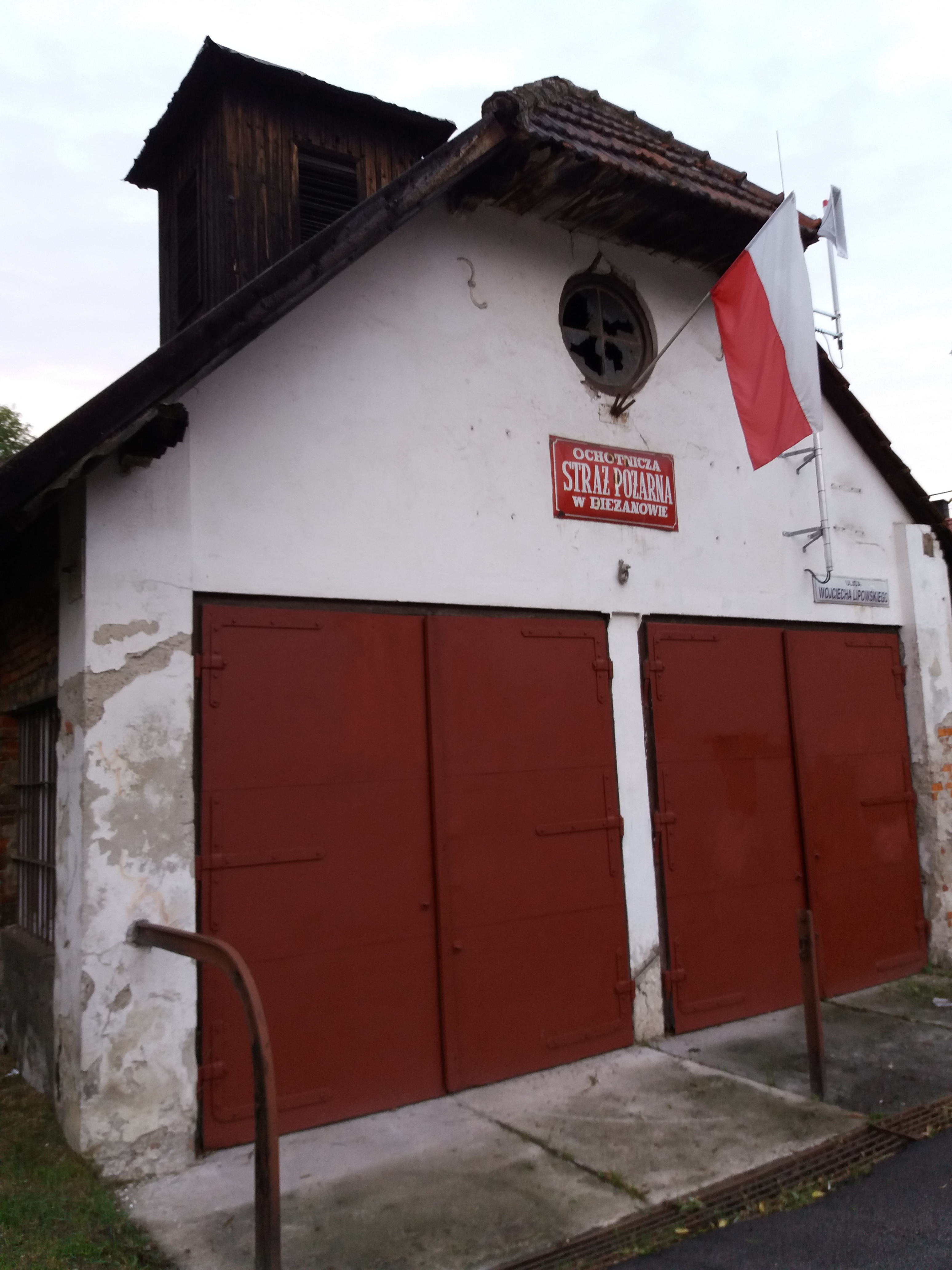 Były budynek Ochotniczej Straży Pożarnej w Krakowie-Bieżanowie